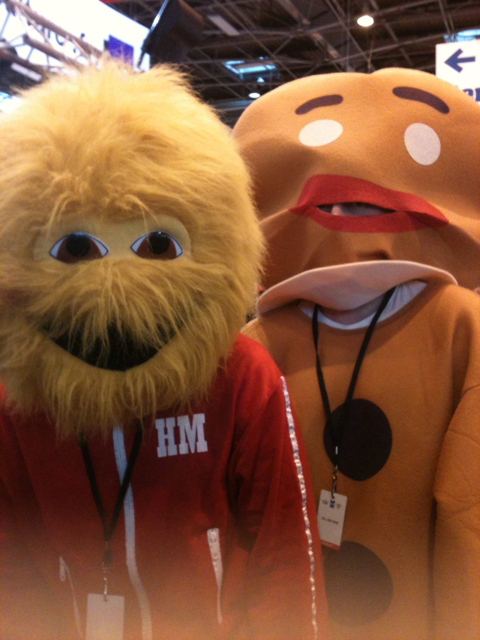 Ça peut faire peur Salon du livre de Paris, 2013.